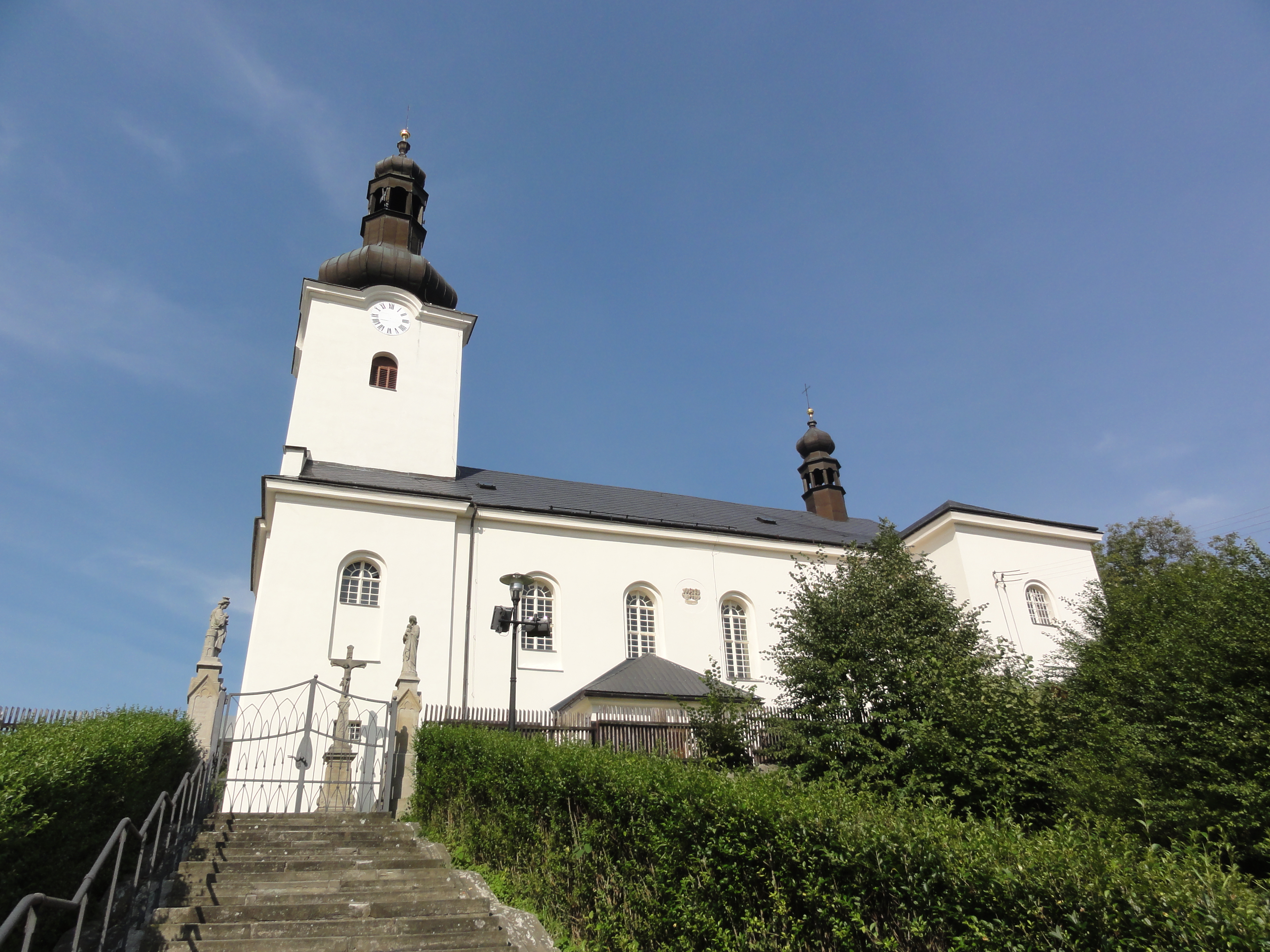 Bruzovice. Kostel svatého Stanislava